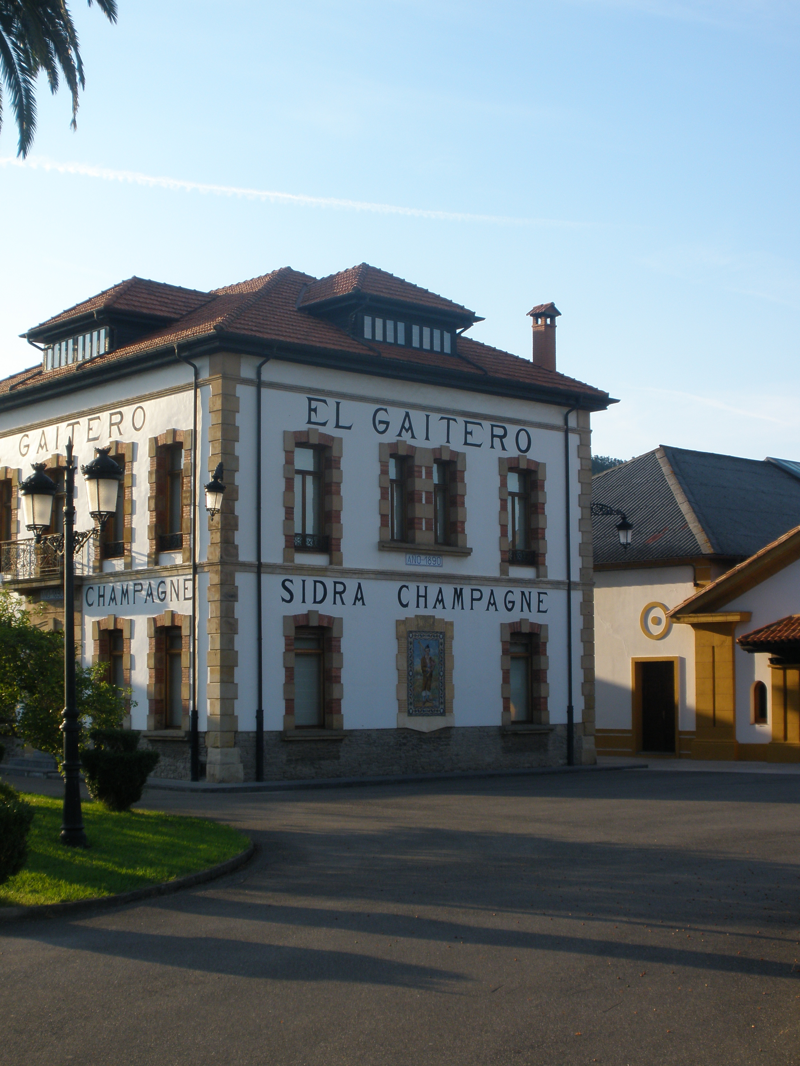 Vista general de uno de los edificios de la fábrica de Sidra El Gaitero en Villaviciosa, Asturias, en agosto de 2012